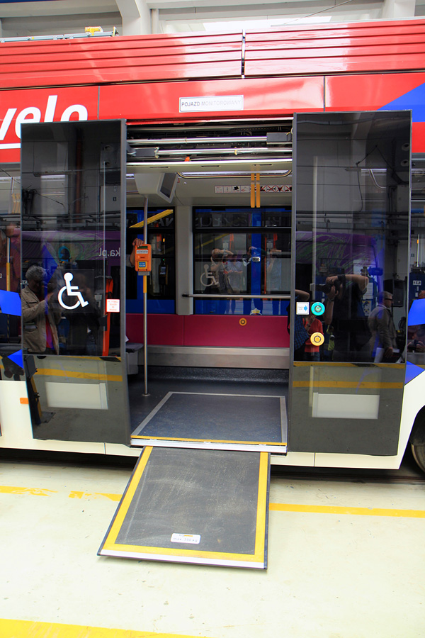 Wejście wyposażone w rampę elektryczną dla niepełnosprawnych.